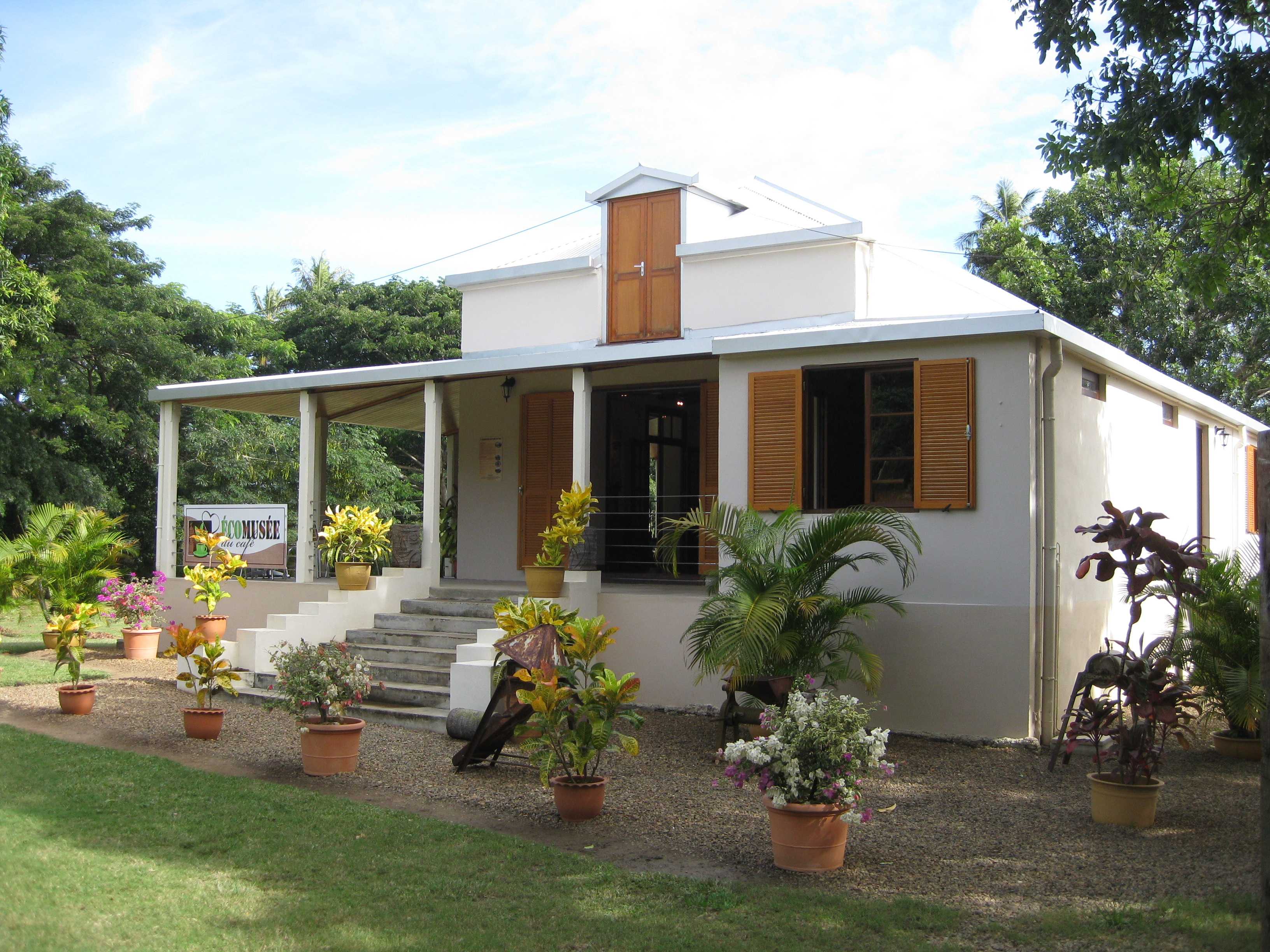 EcoMusée à Voh